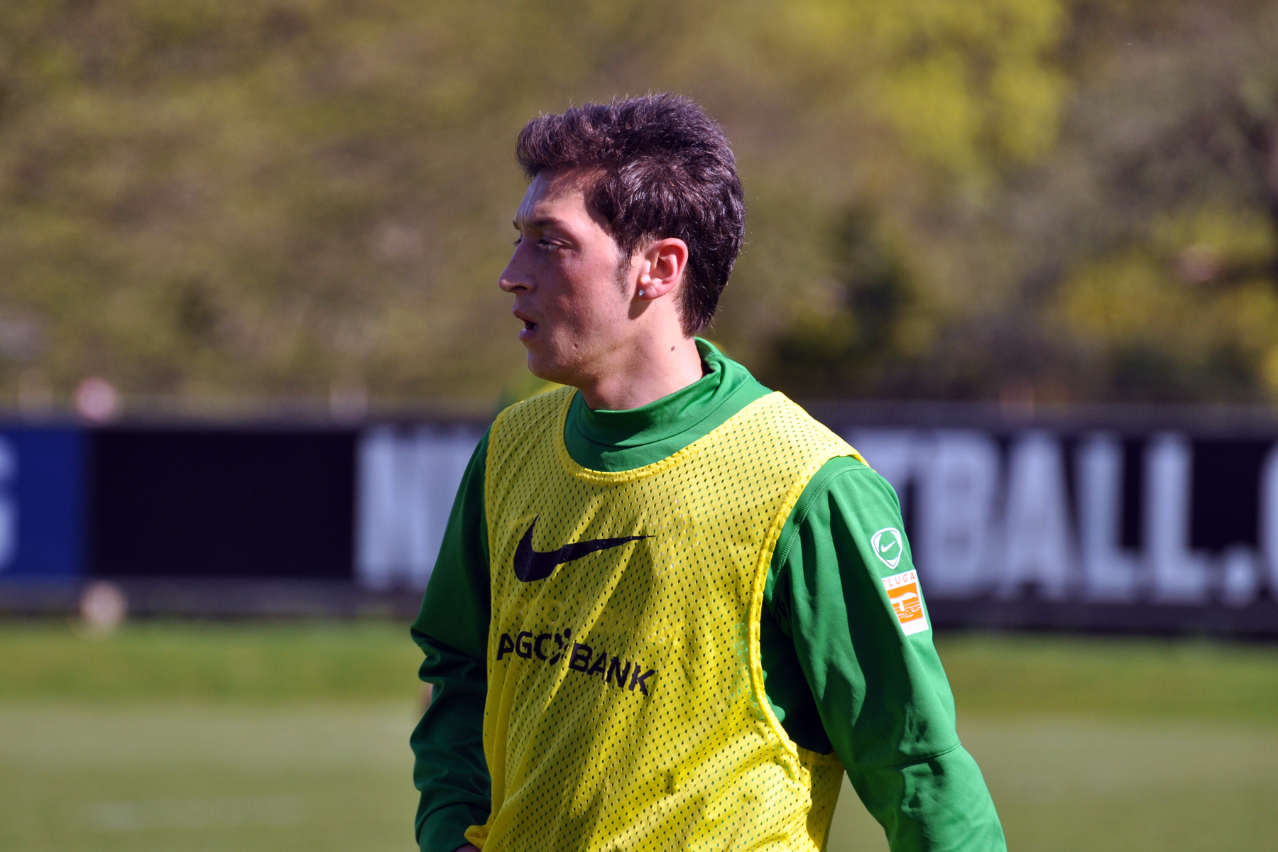 Mesut Özil à l'entraînement le 23 avril 2010 avec son club du Werder de Brême.